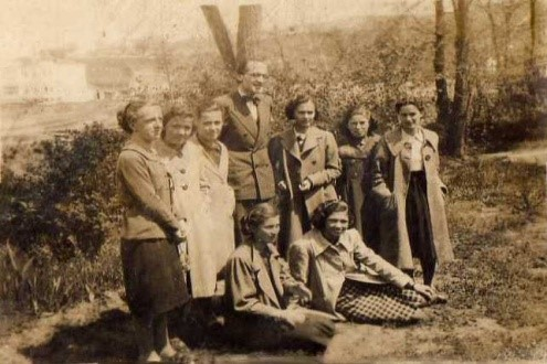 Pr.Weincler dhe Hatixhe Alizoti nga e majta e tij.